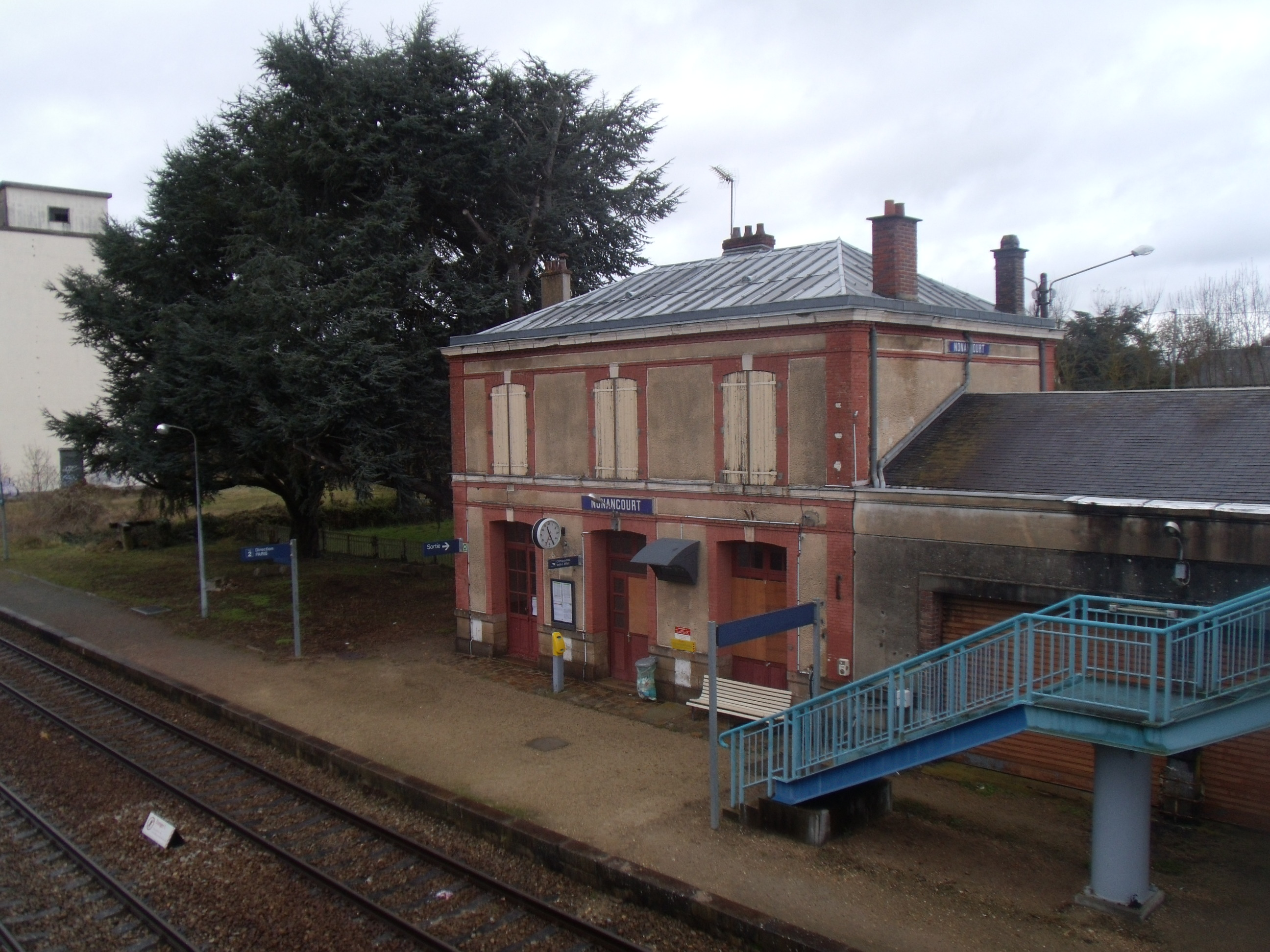 Le BV de la Gare de Nonancourt vu de la passerelle